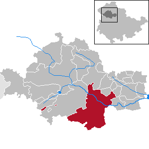 Bad Langensalza in Thuringia - Unstrut-Hainich-Kreis